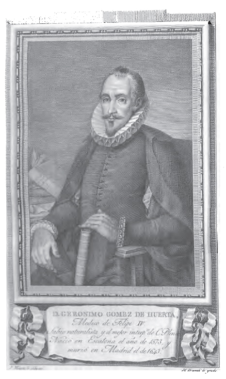 Retrato de Gerónimo Gómez de Huerta.